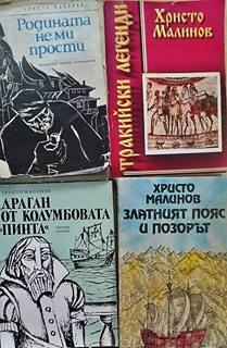 Корици на някои от книгите на Христо Малинов, български писател